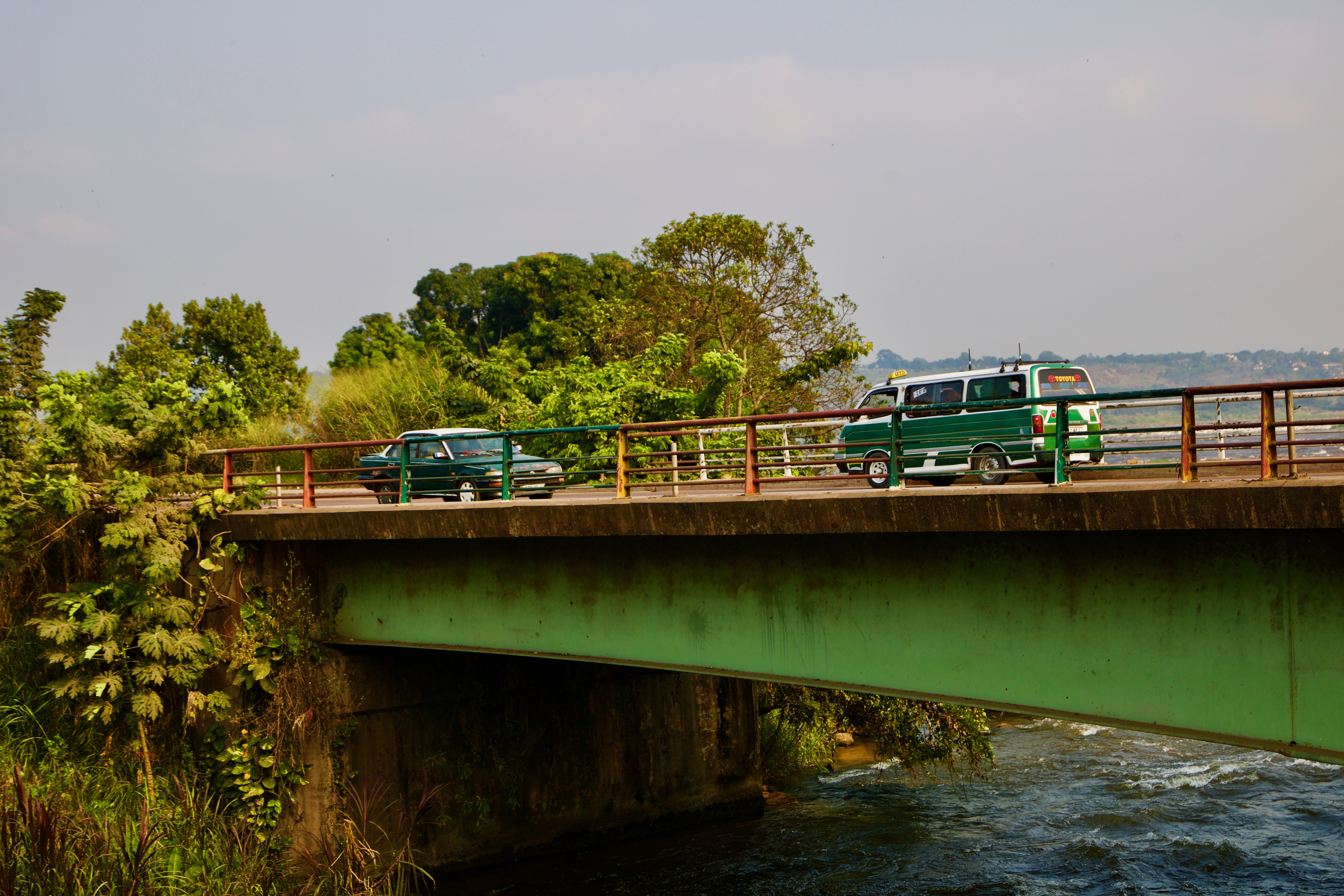 Photographie représentant la beauté de l'alliance entre architecture et nature. This is an image with the theme "Africa on the Move or Transport" from: Congo